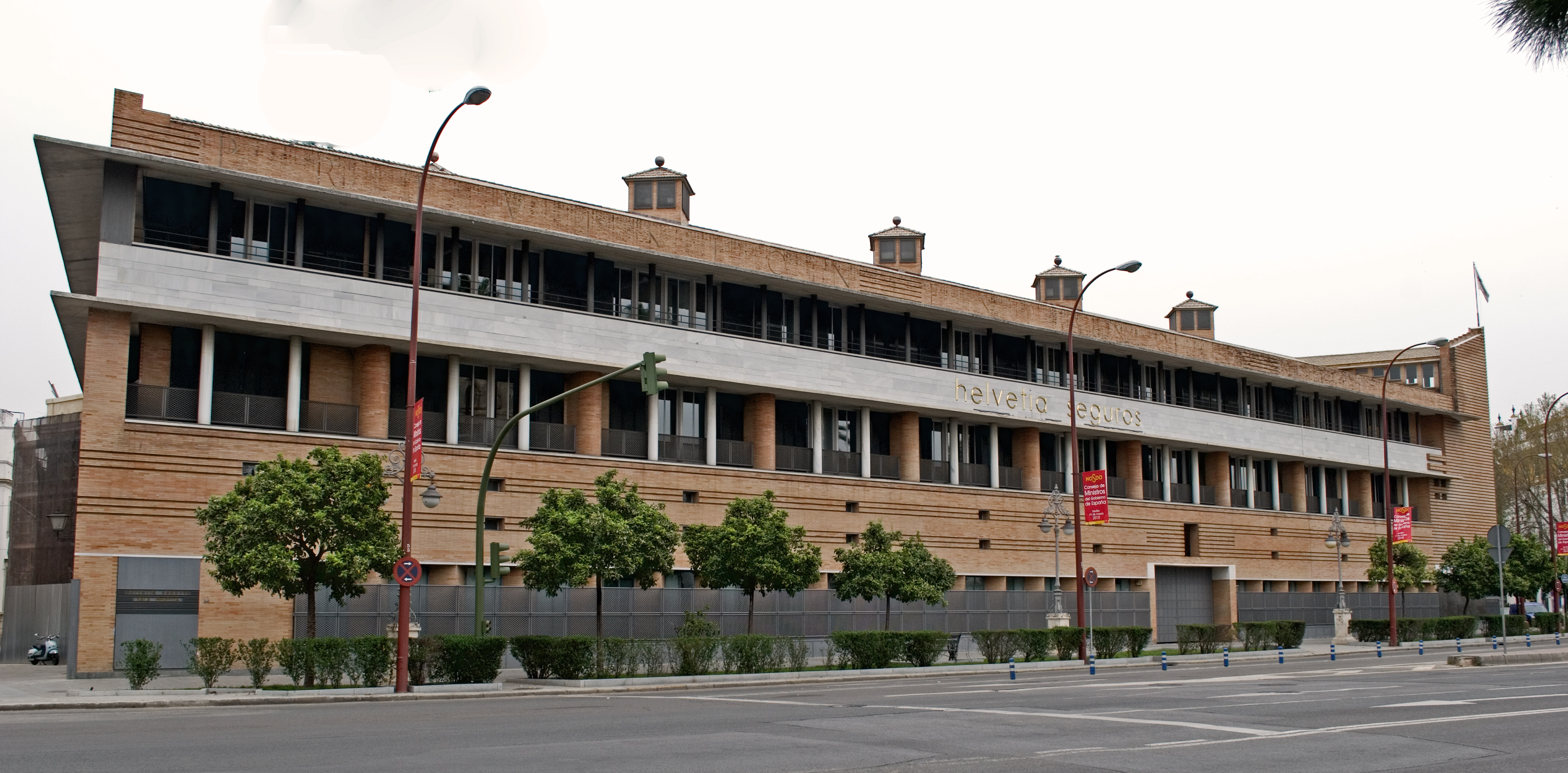 Edificio de Previsión Española, arquitecto Rafael Moneo, año (1982-1987), Sevilla.